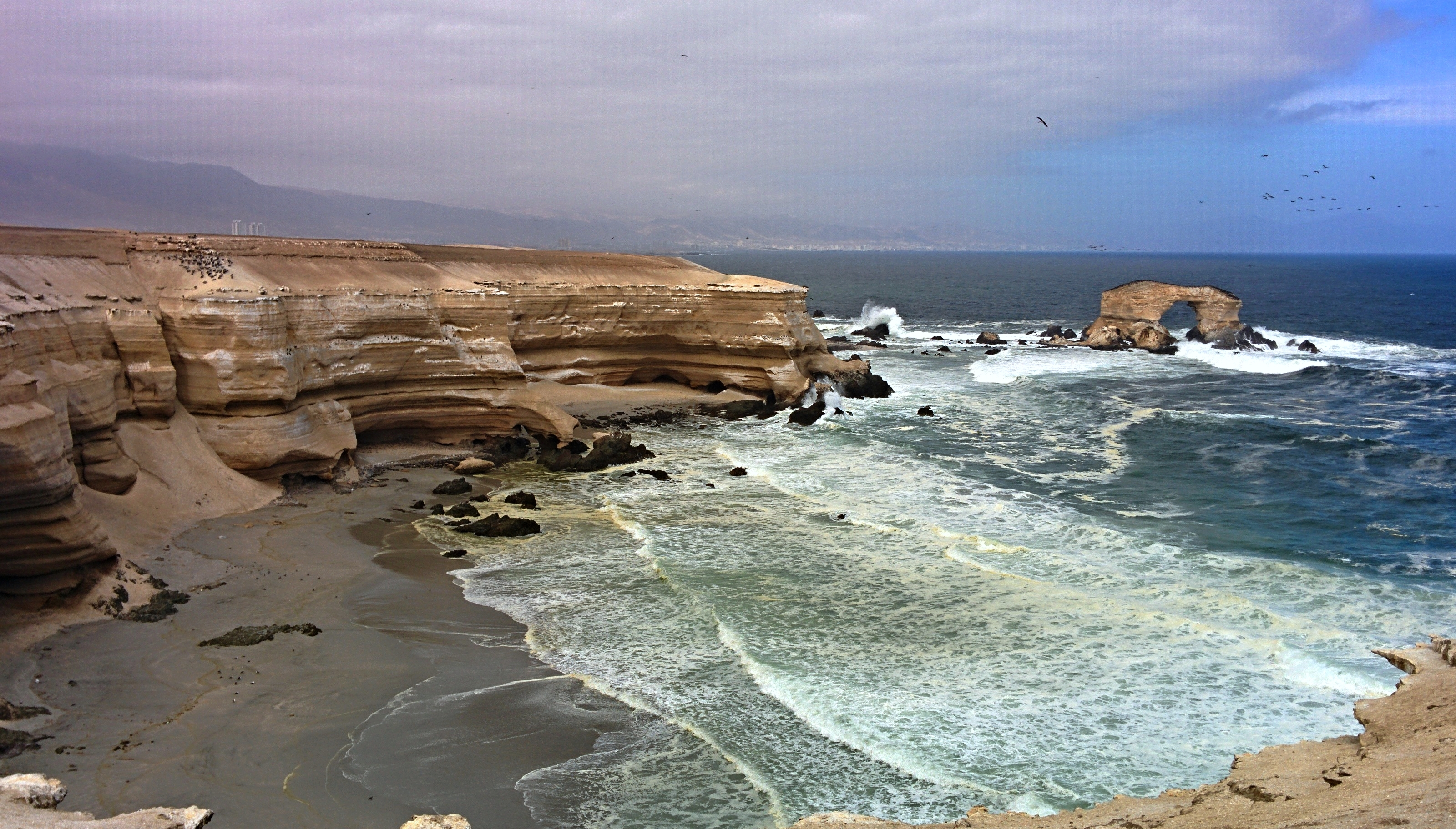 La Portada, Antofagasta, Región de Antofagasta, Chile.